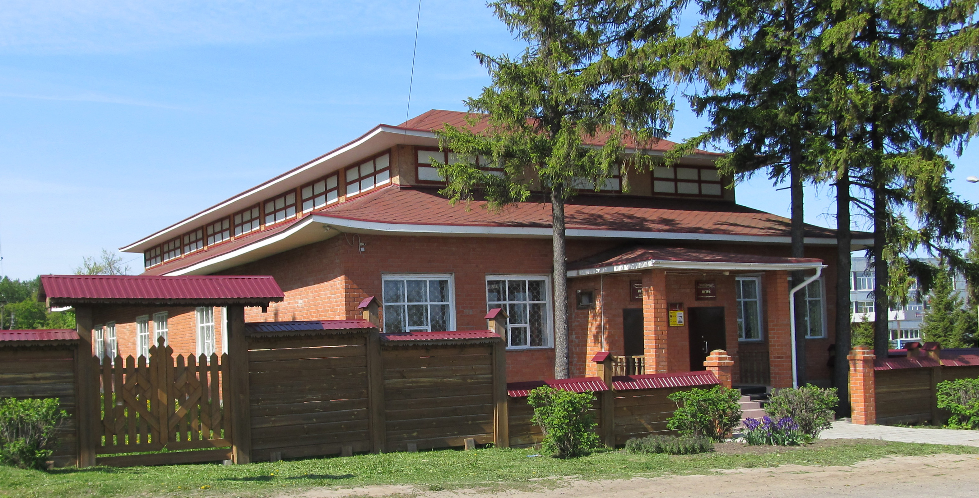 МУЗЕЙ «БИЧУРИН И СОВРЕМЕННОСТЬ» п. Кугеси Чувашской Республики